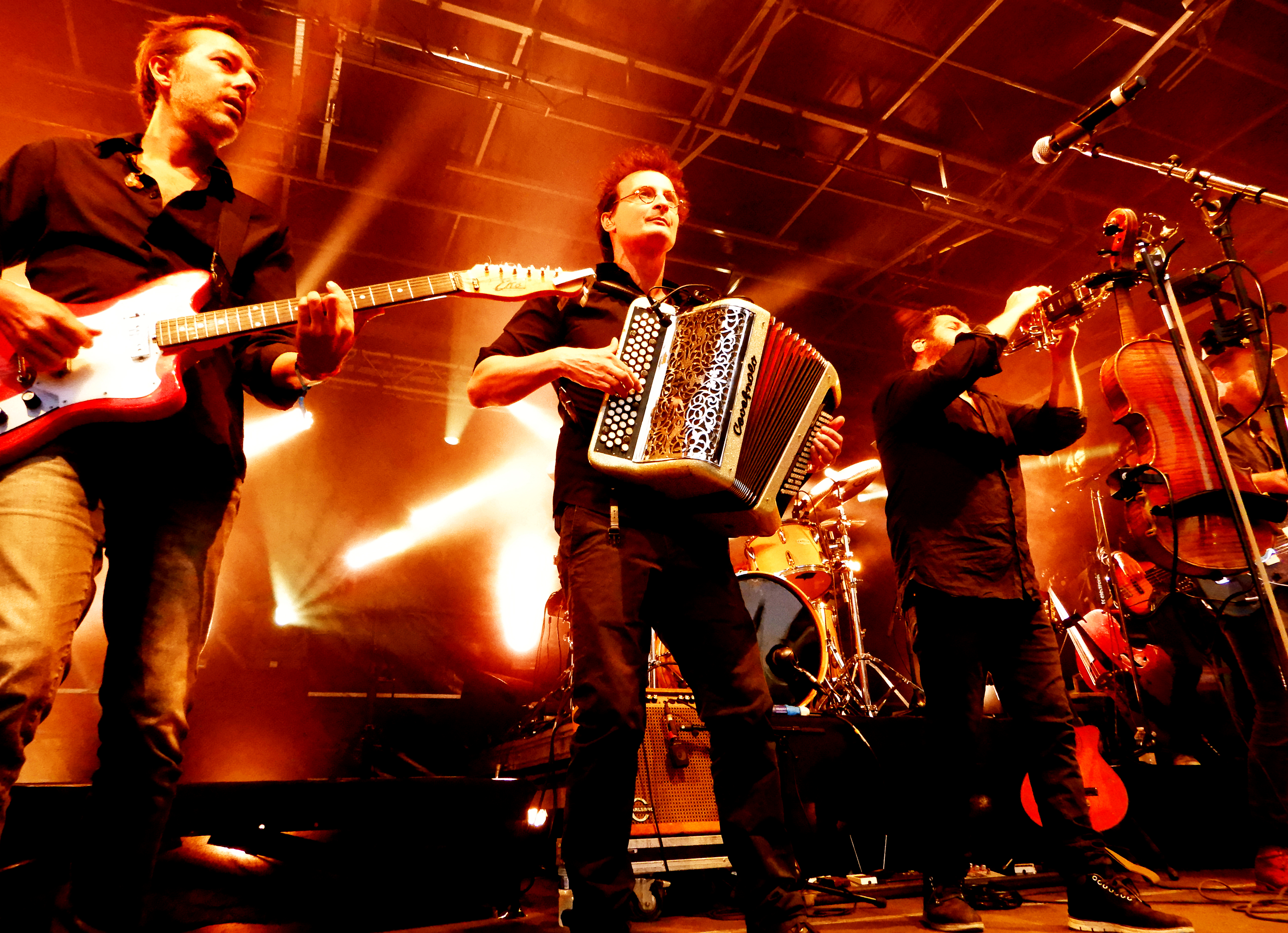 DSLZ le 13 septembre 2019 à Grandchamp (44)